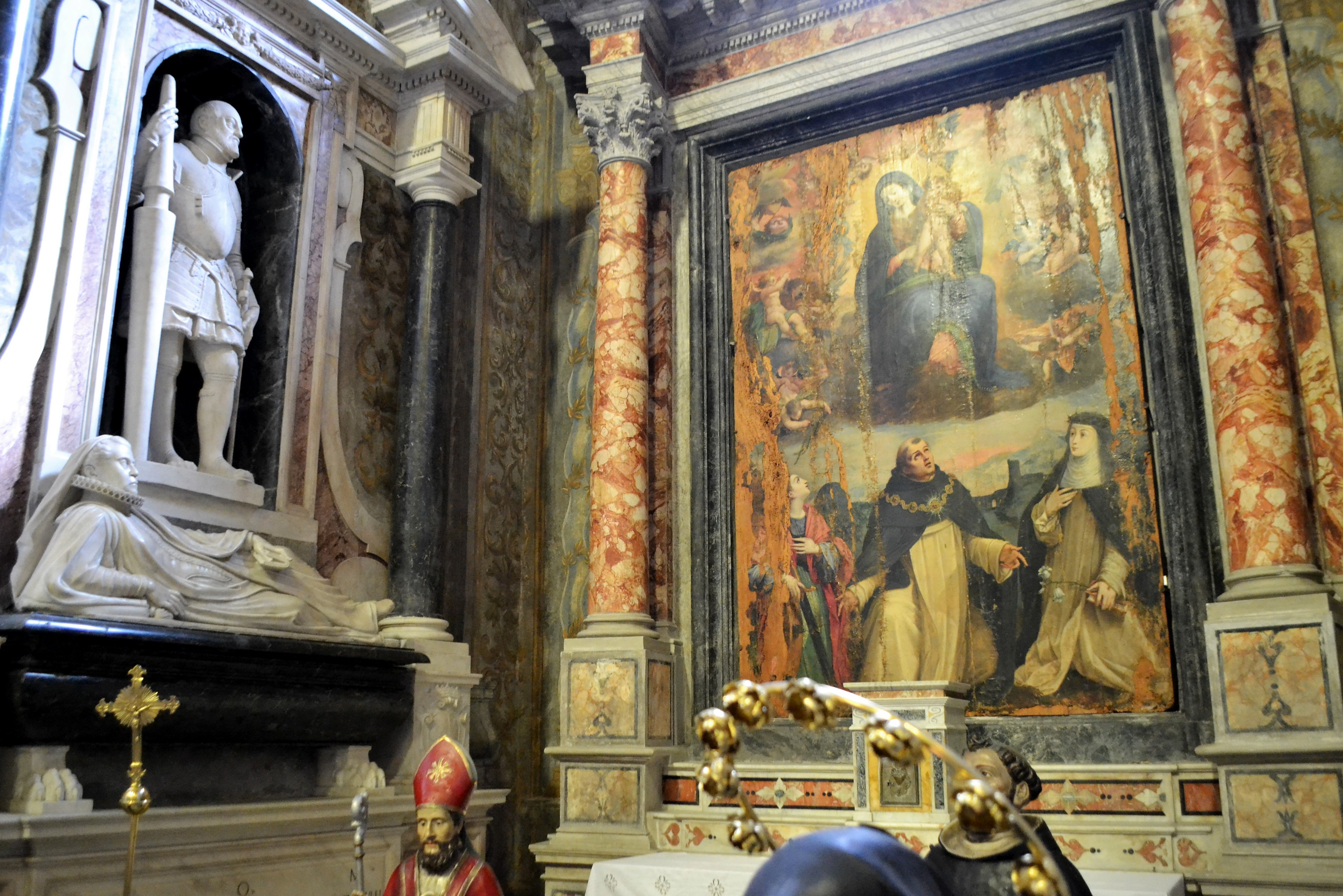 Cappella Acciapaccia - Chiesa di Santa Caterina a Formiello di Napoli Particolare del dipinto di Wenzel Cobergher del 1590 della Madonna col Bambino e san Tommaso d'Aquino. A sinistra è il monumento funebre a Federico Tomacelli del 1604